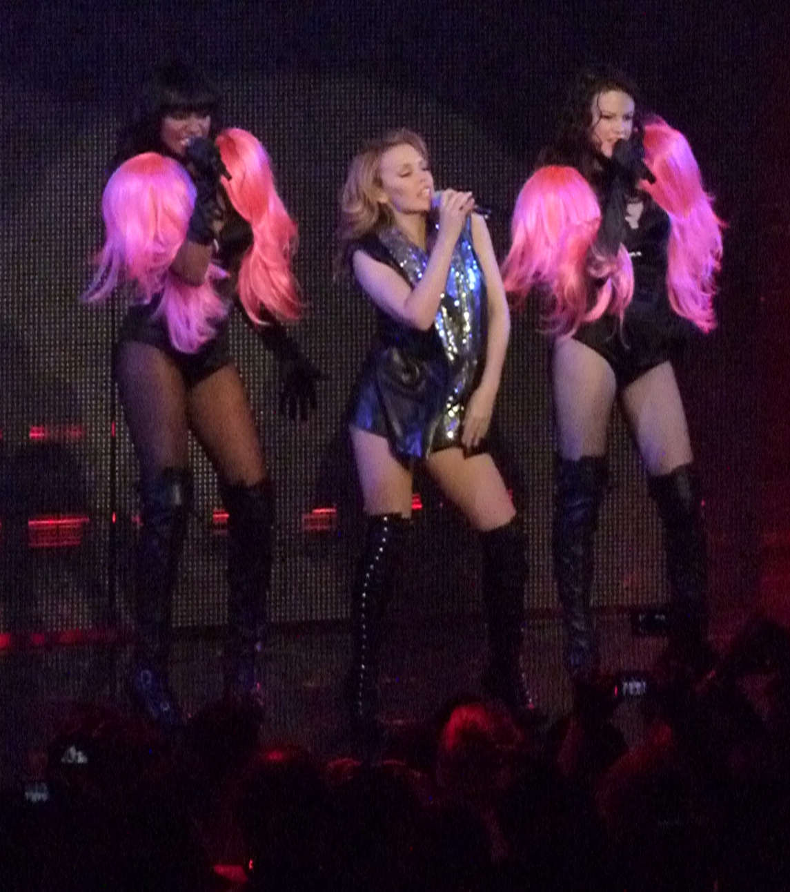 Kylie Minogue haciendo un perfomance en su tour norteamericano